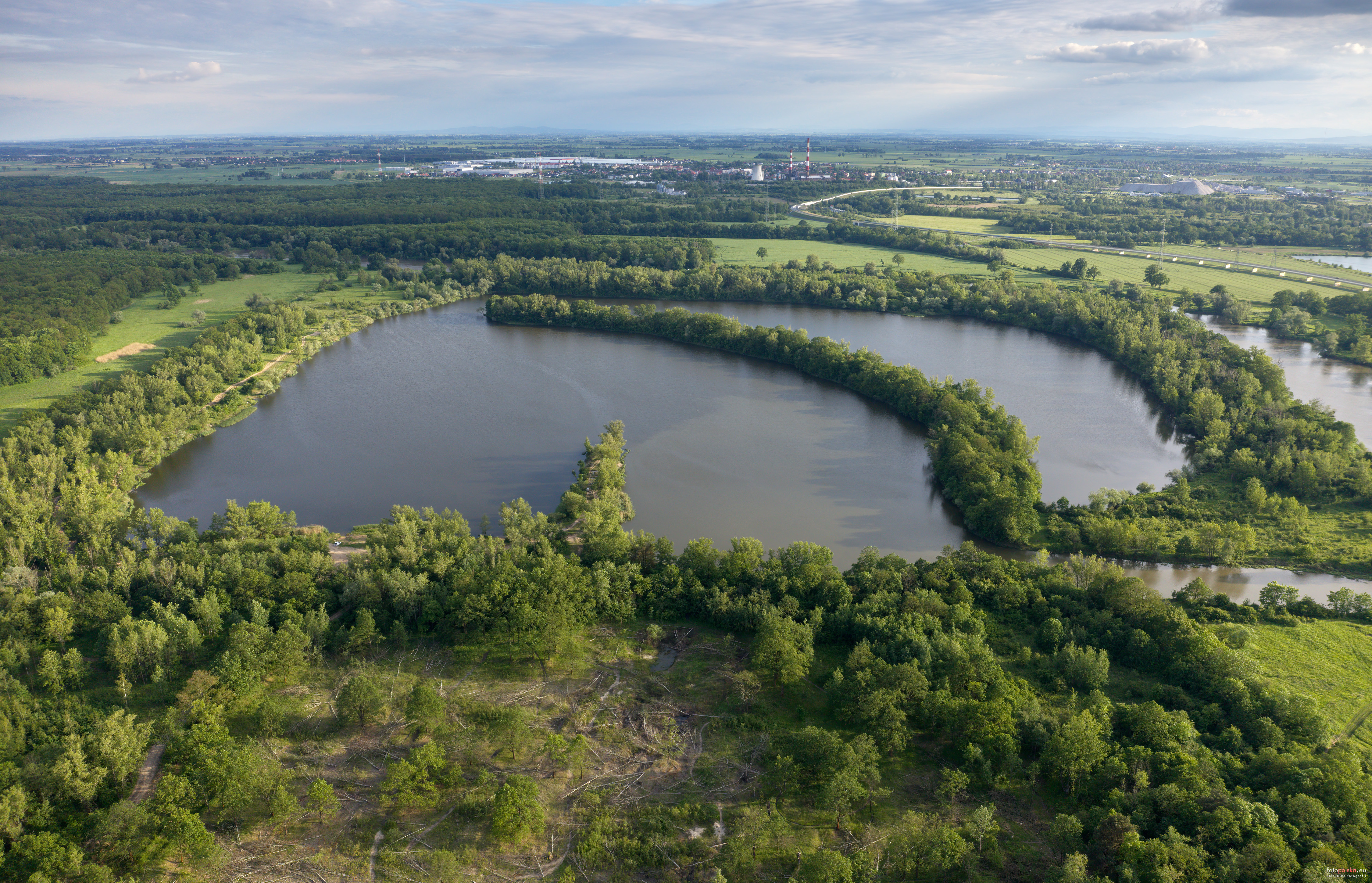 Zalew Bajkał, Kamieniec Wrocławski. Na dalekim planie widoczne kominy Elektrociepłowni "Czechnica"